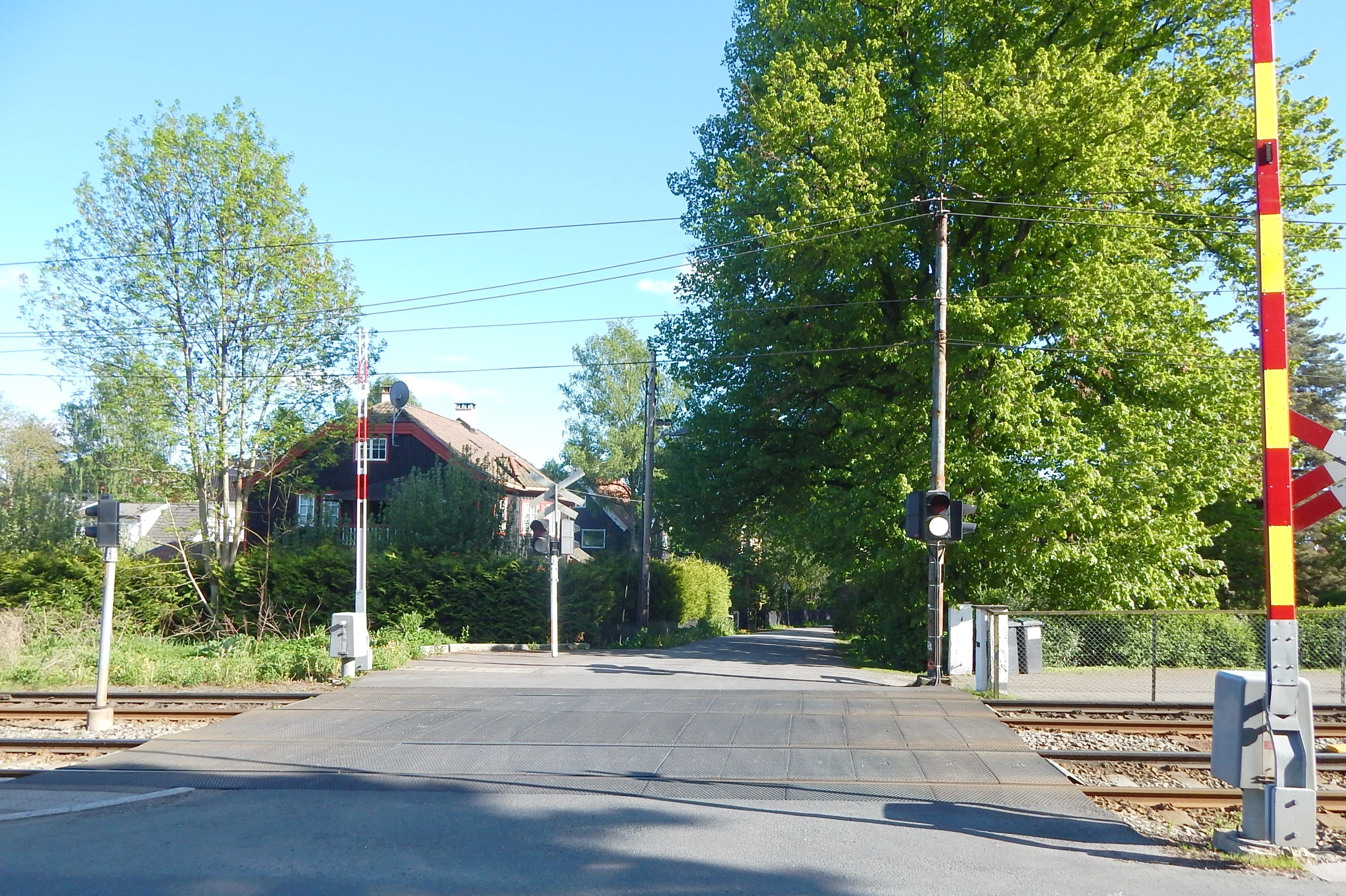 Adventveien krysser Lilleakerbanen på planovergang.